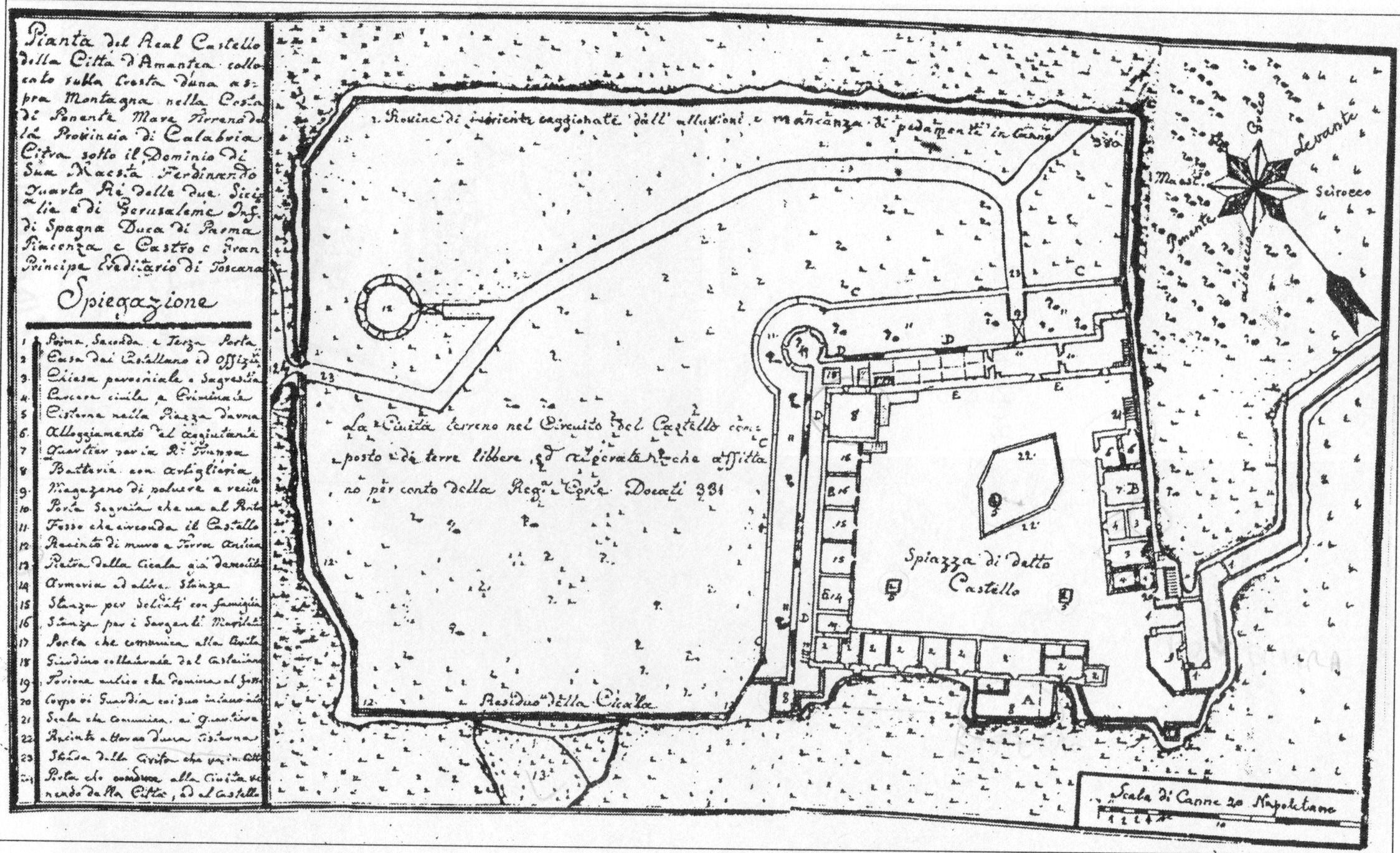 Pianta del Castello di Amantea nel Settecento